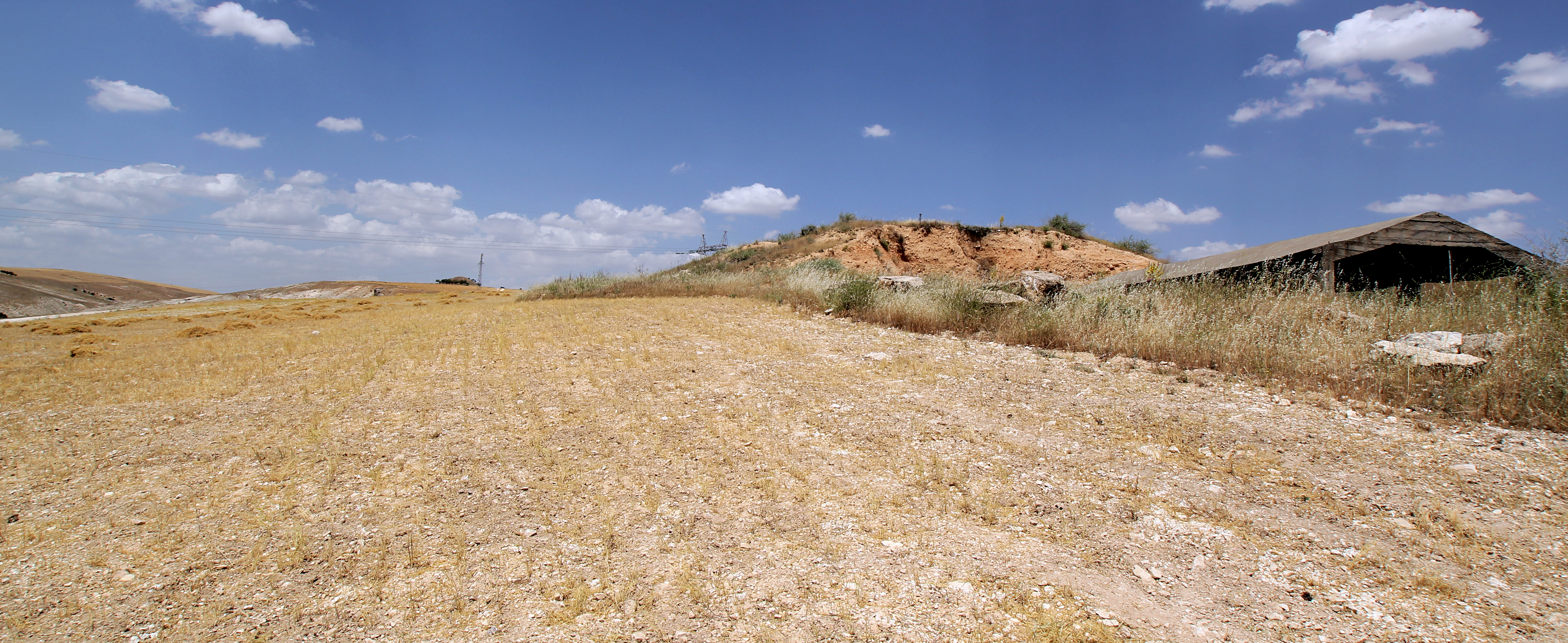 Tumulus B von Sofraz mit Kammergrab, im Hintergrund Tumulus A, Umgebung von Besni, Südosttürkei